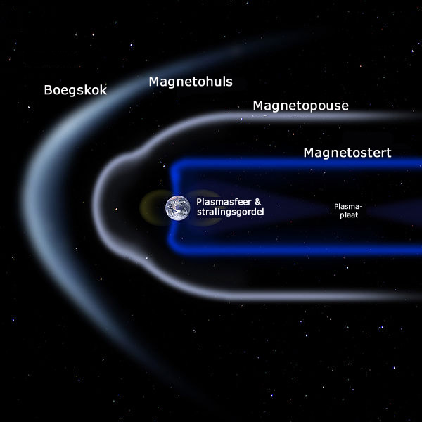 Die Aarde se magnetosfeer